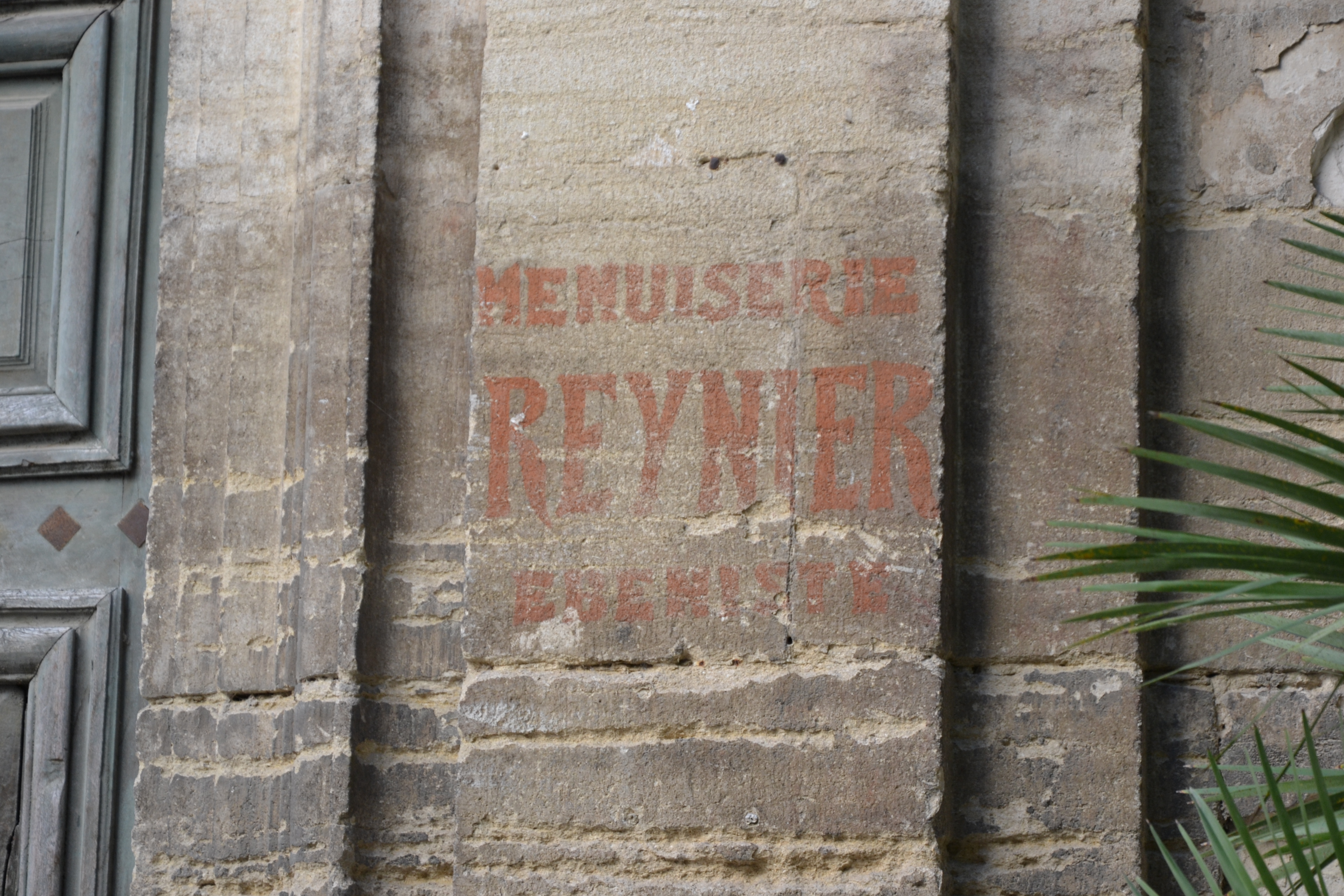 Chapelle bâtie par la confrérie des Pénitents noirs entre 1738 et 1741 sur un plan d'Antoine d'Allemand. L'édifice a servit, quelques temps, de menuiserie. .